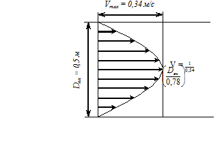 Епюра